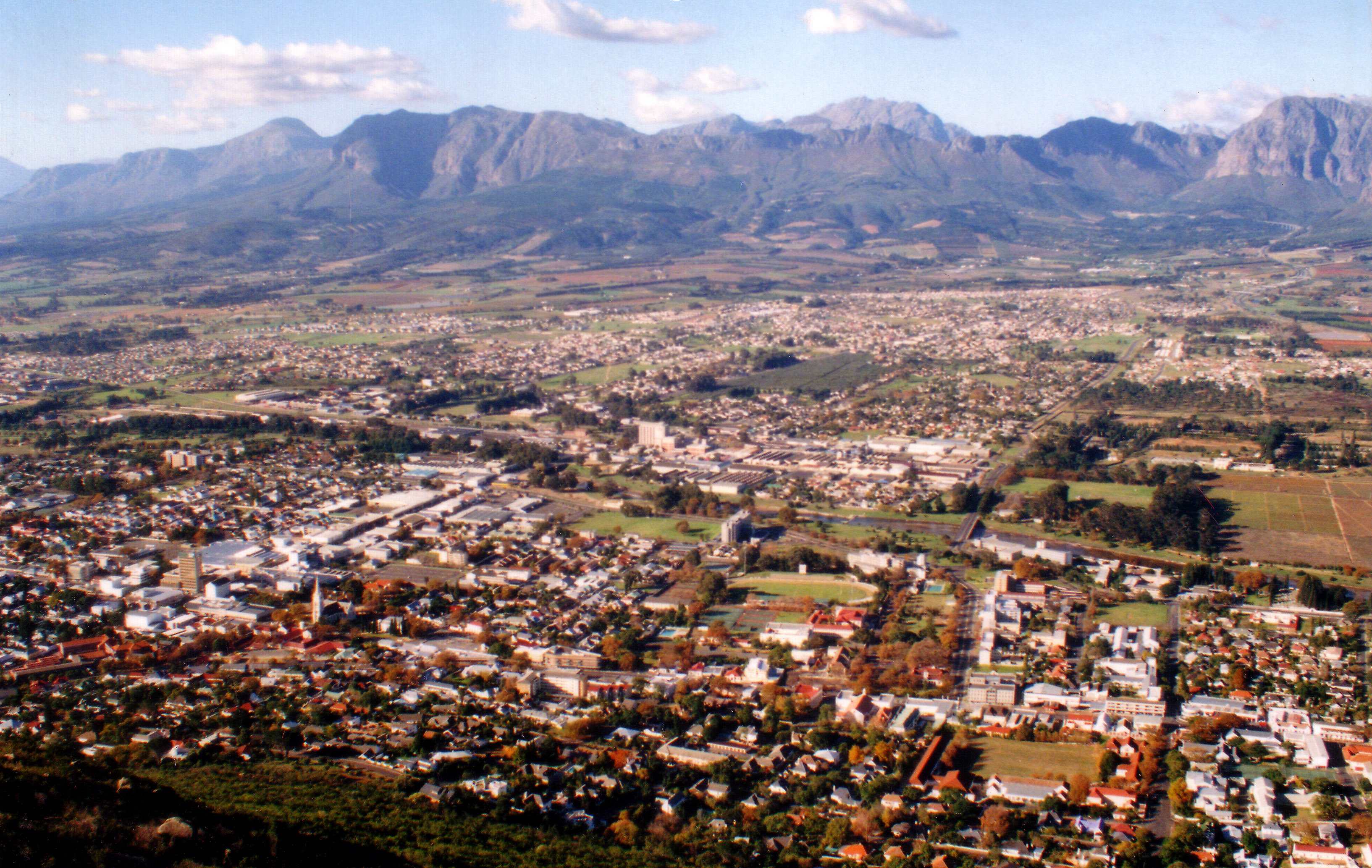 Taken by Myself, Andres de Wet